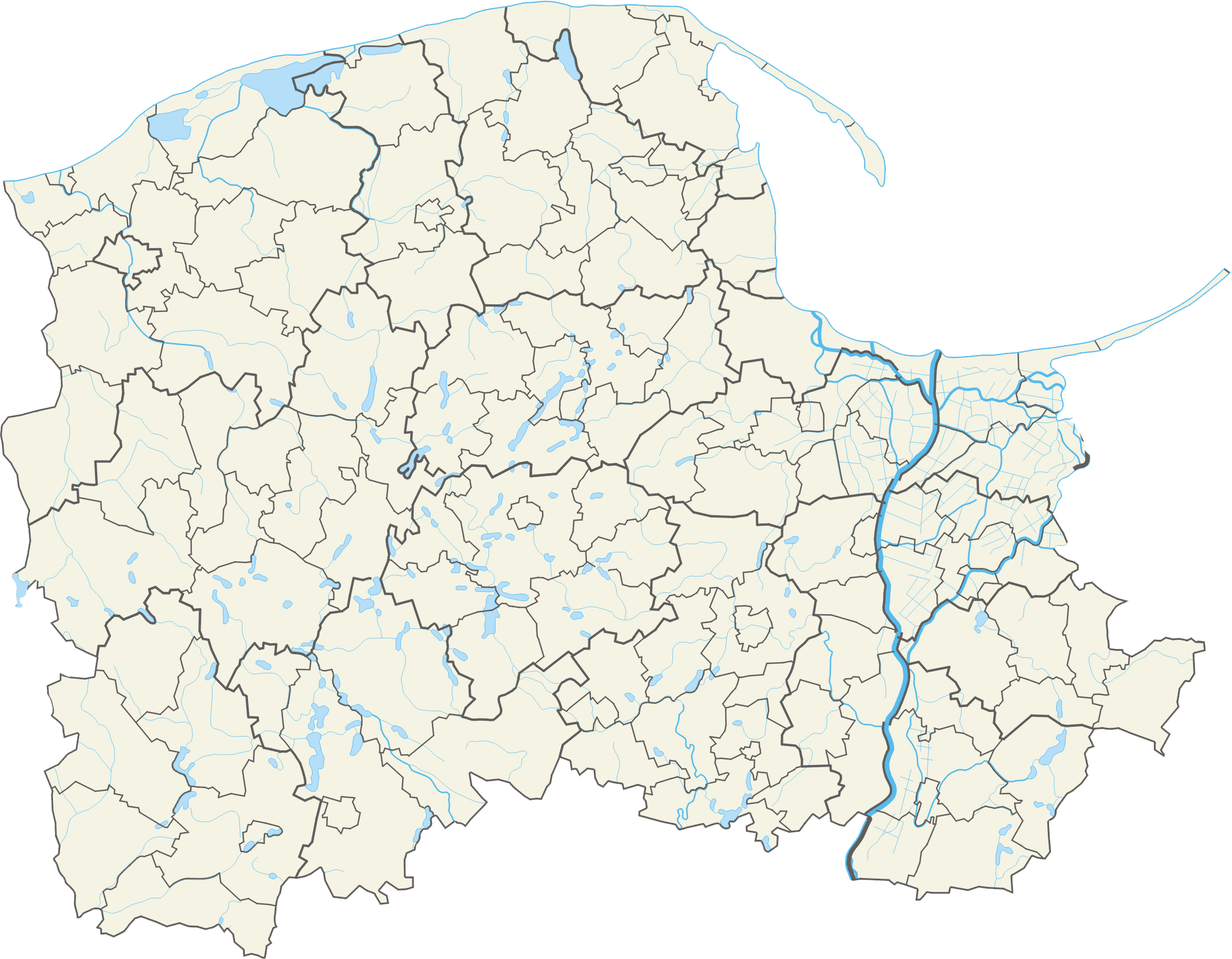 Województwo pomorskie – powiaty i gminyWspółrzędne graniczne mapy: N: 54.8358° N S: 53.4909° N W: 16.6992° E E: 19.6470° E